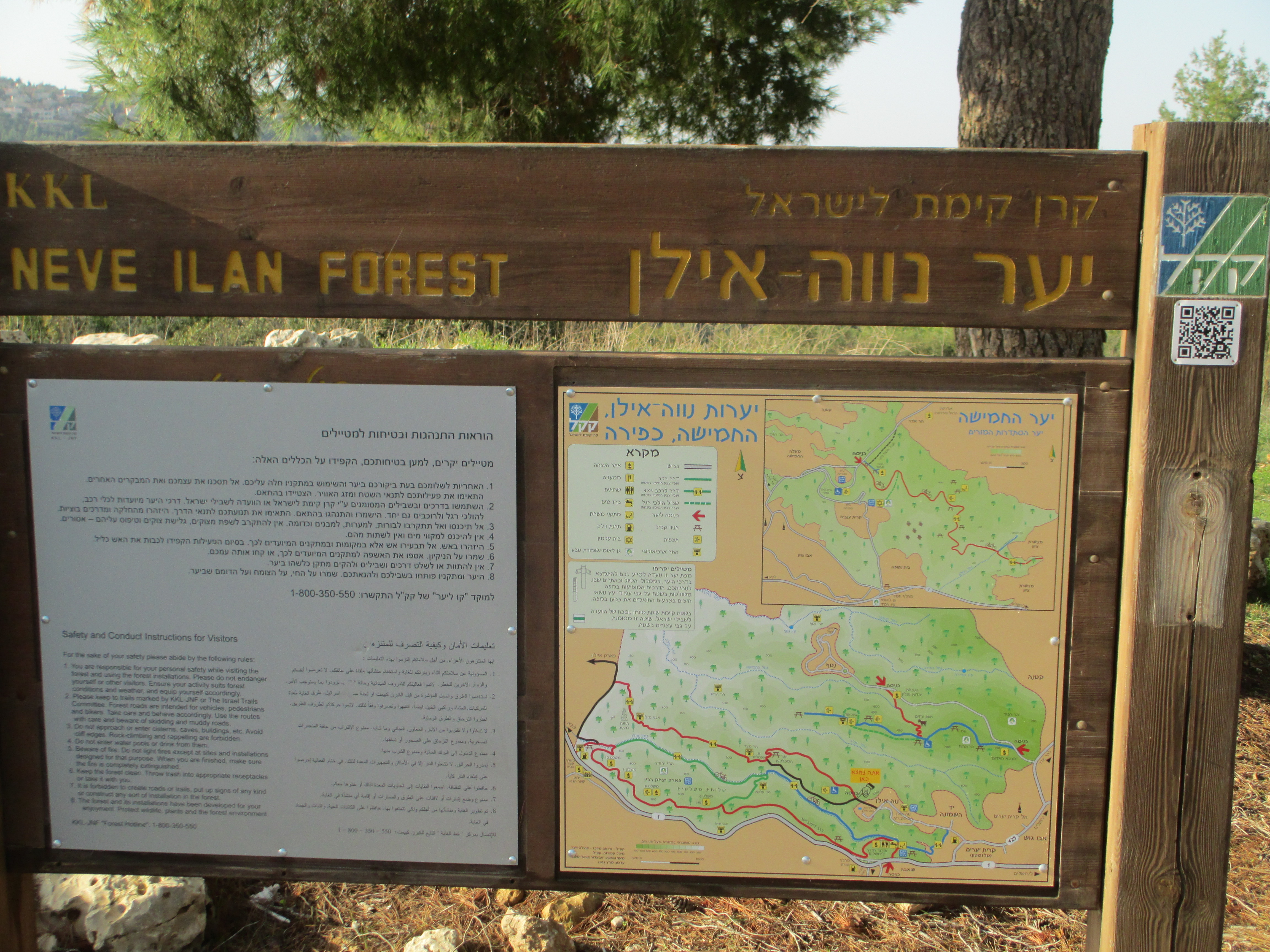 יער נווה אילן